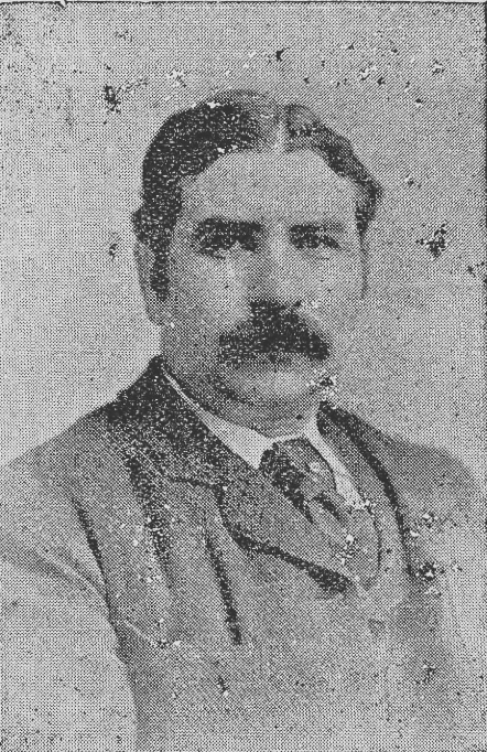 Syr Evan Vincent Evans (1851-1934)